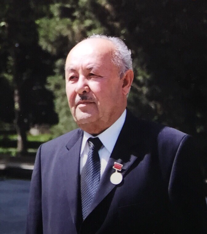 Фотография Хаёева Изатулло Хаёевича